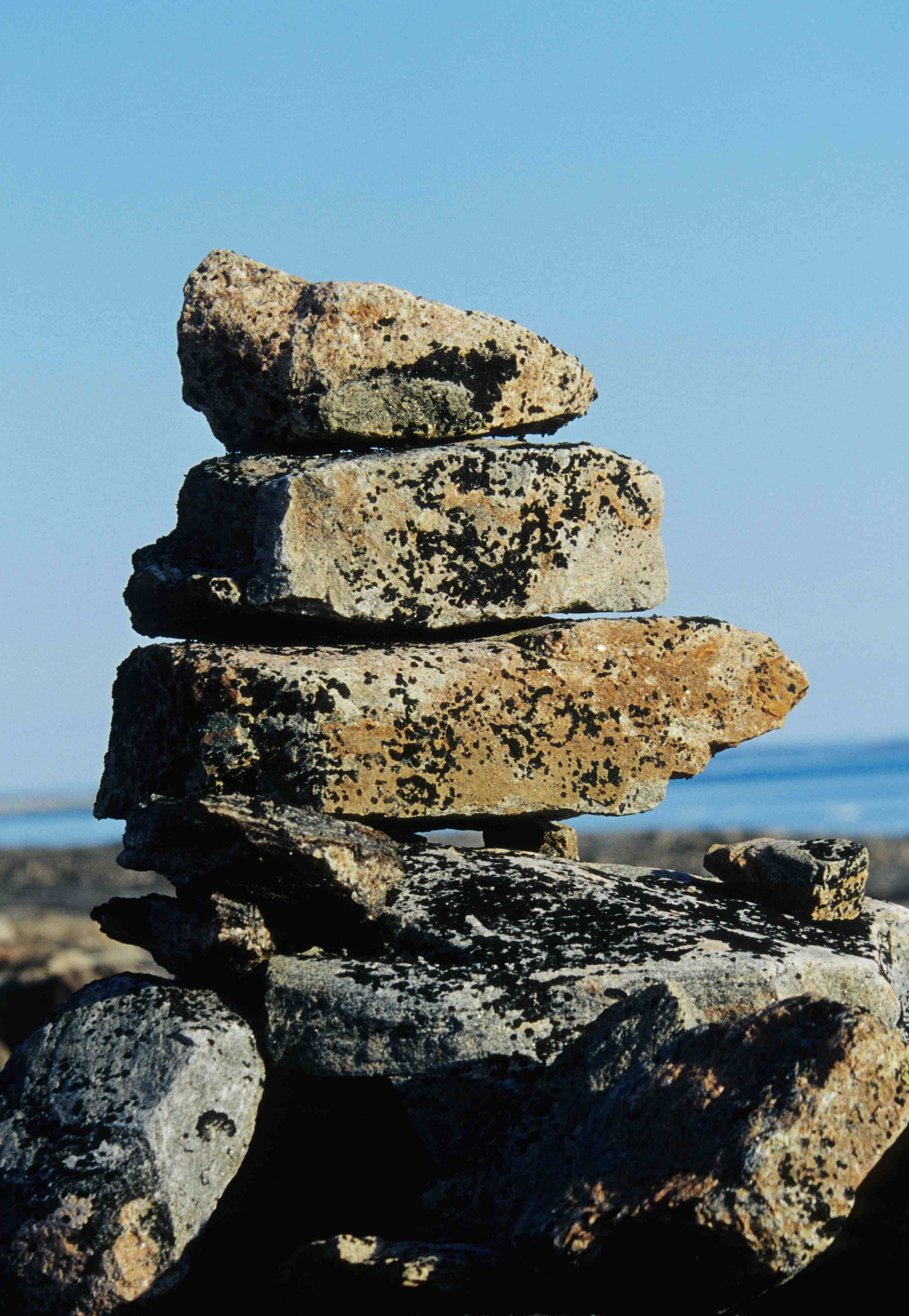 Inuksuk, Foxe Peninsula (Baffin Island), Nunavut, Canada